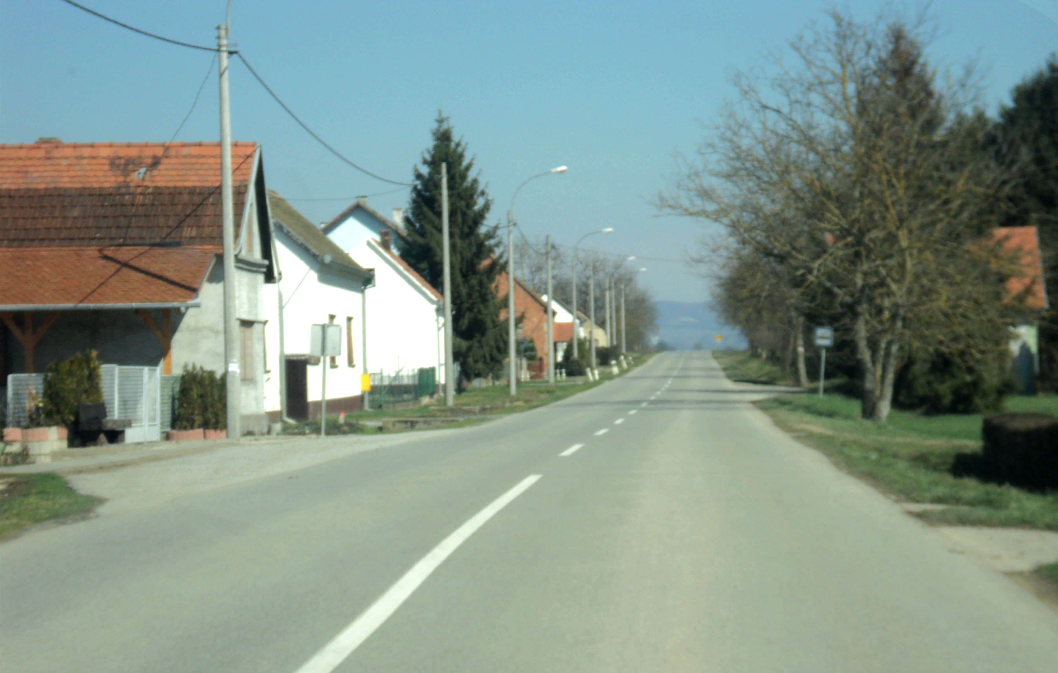 Sesvete kod Požege